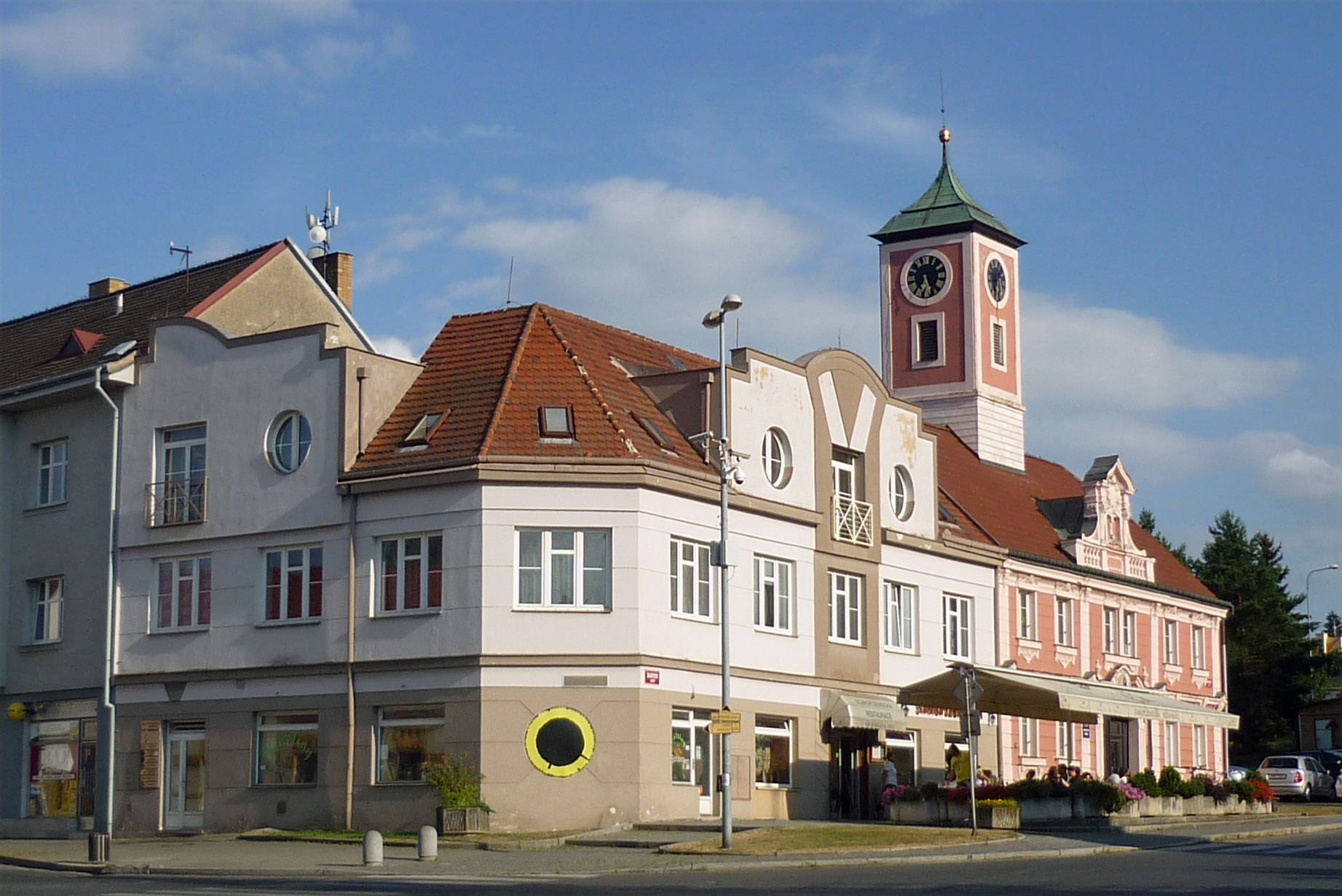 Rathaus von Altpilsen (Starý Plzenec)